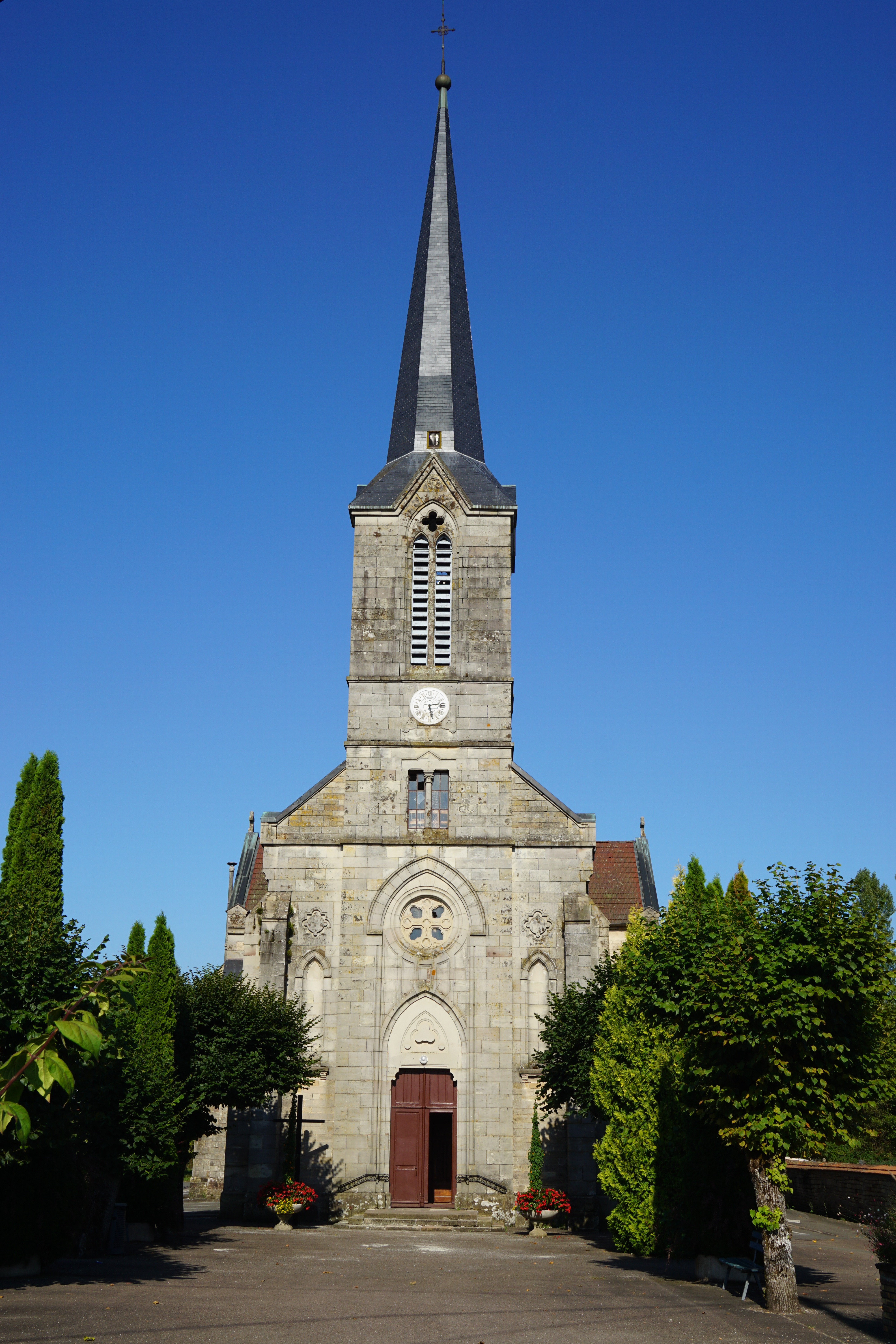 L'église de La Côte (Haute-Saône).